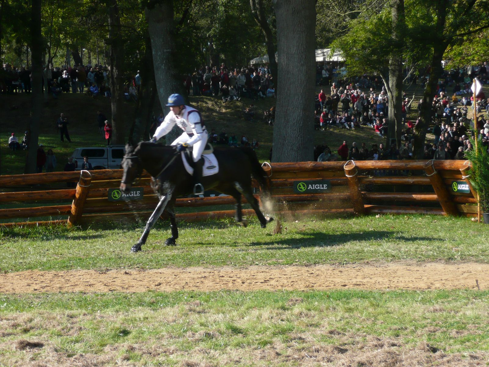 Eventing Mondial du Lion 2007